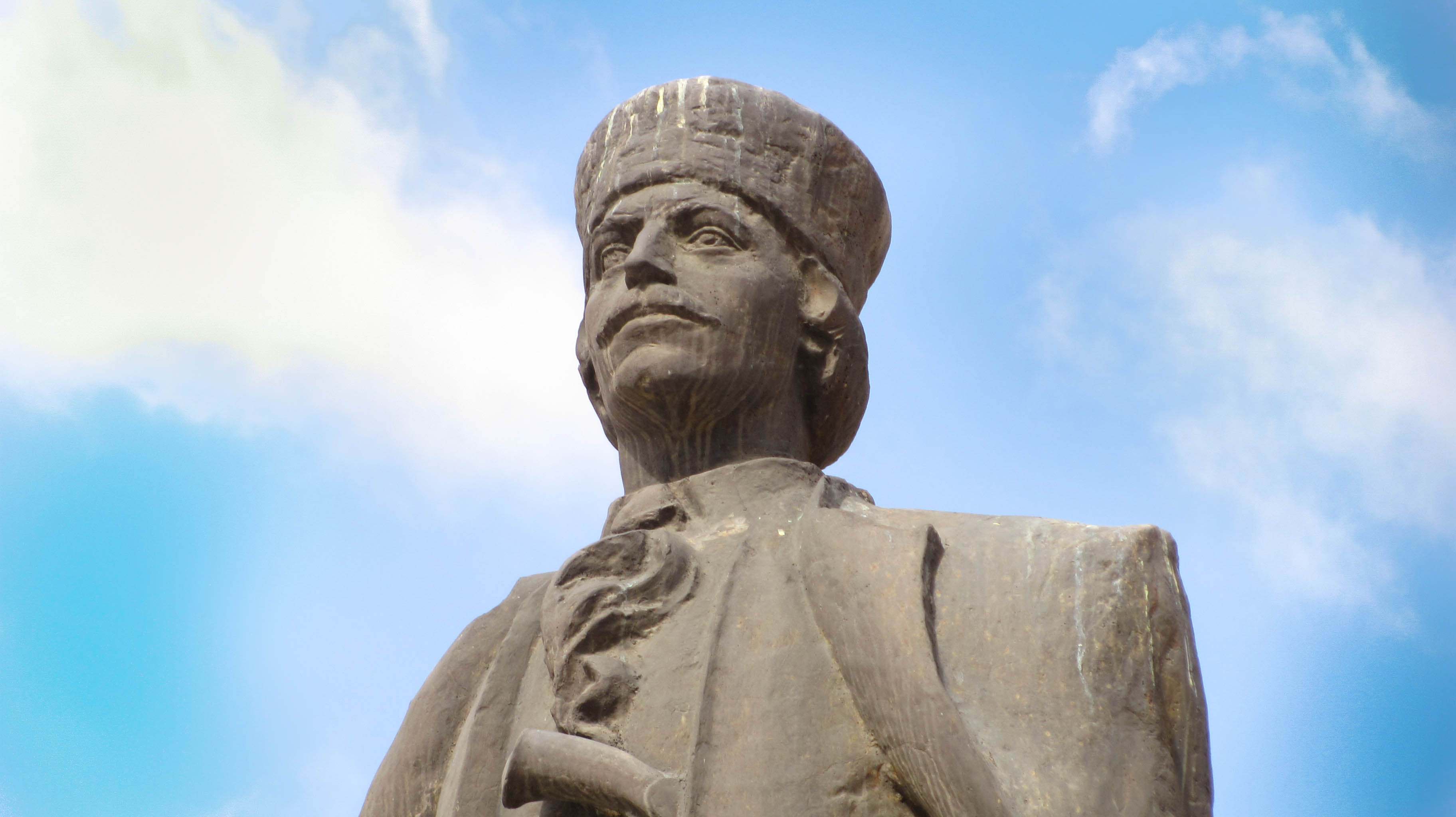 Turda - Statuia lui Avram Iancu, detaliu (Piaţa Republicii)